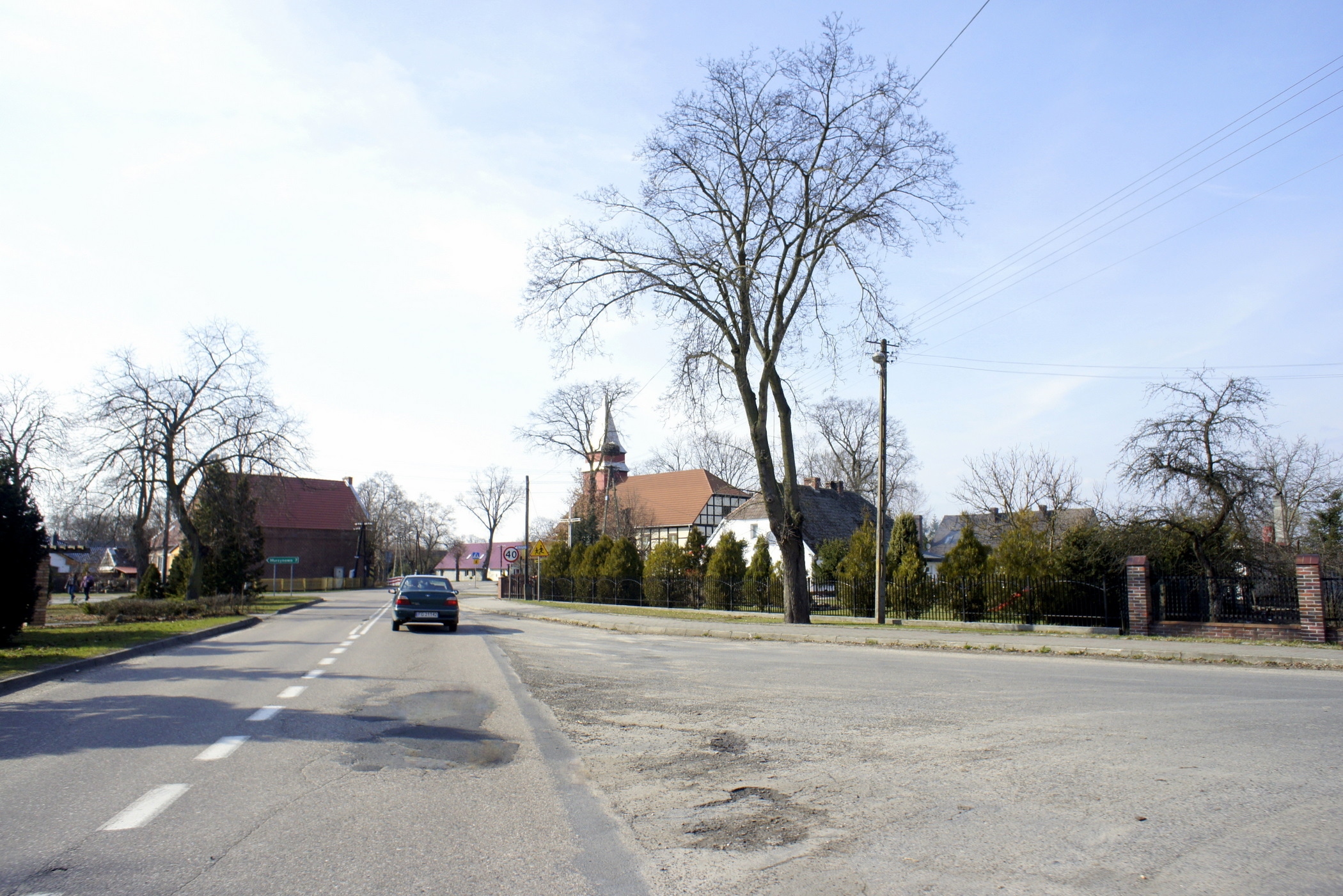 Stare Polichno, gm. Santok, powiat gorzowski. Droga wojewódzka nr 158